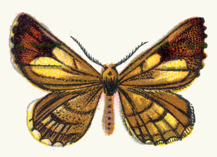 Bupalus piniaria male